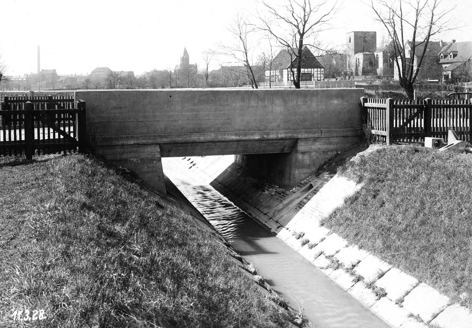 Die Emscher in Aplerbeck mit der Georgskirche, (rechts noch als Ruine) und der alten St. Ewaldikirche (Bildmitte) um 1928